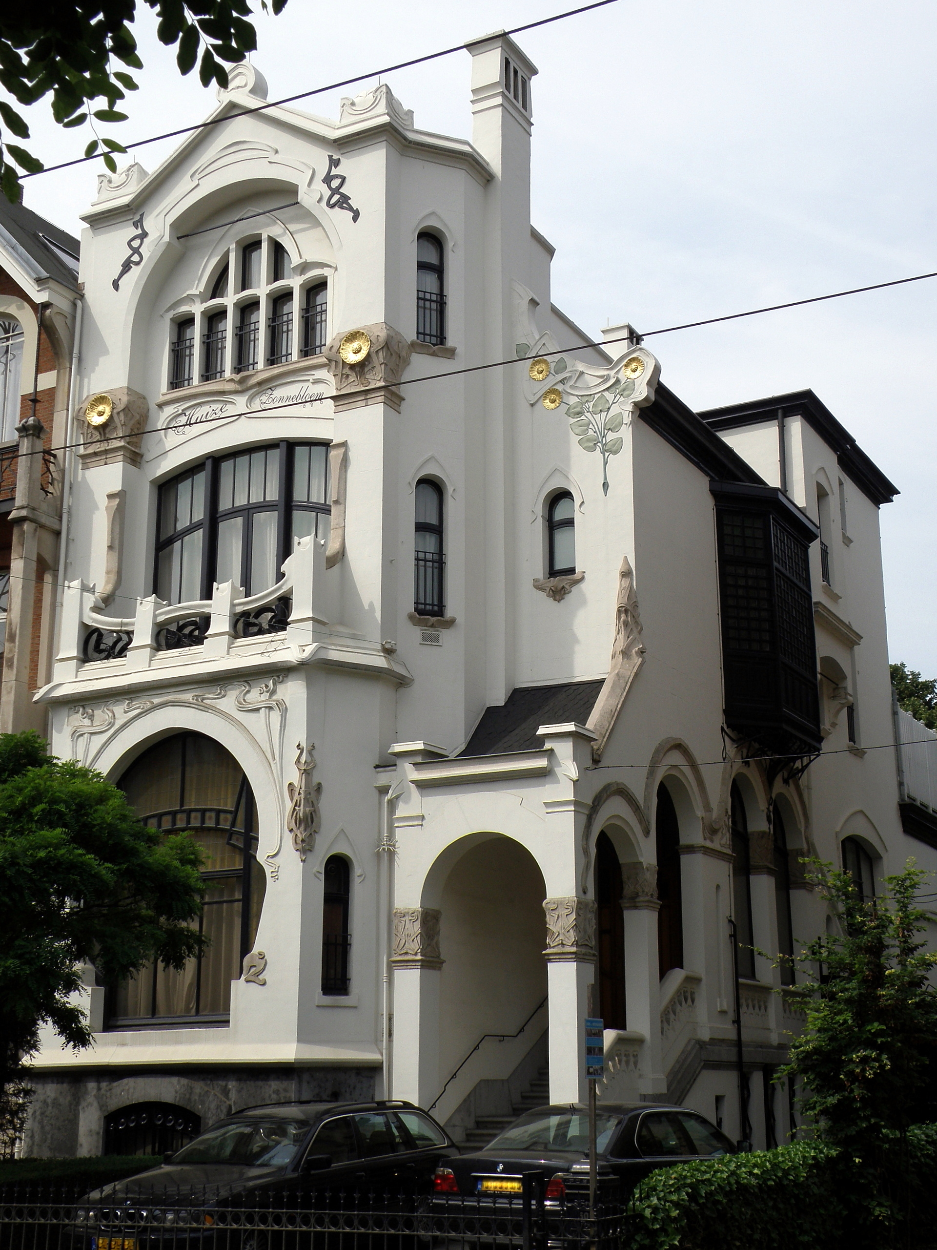 Anvers, Belgique. Maison de style Art nouveau, dénommée Huize Zonnebloem (litt. maison Tournesol), sise au n° 50 de la Cogels-Osylei, dans le quartier Zurenborg (district de Berchem). Architecte Jules Hofman, 1900.